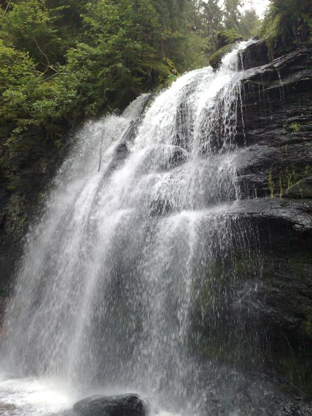 Dette er et bilde av "Fuglefossen" i Risdalen, tatt av Dennis Max Smelien.